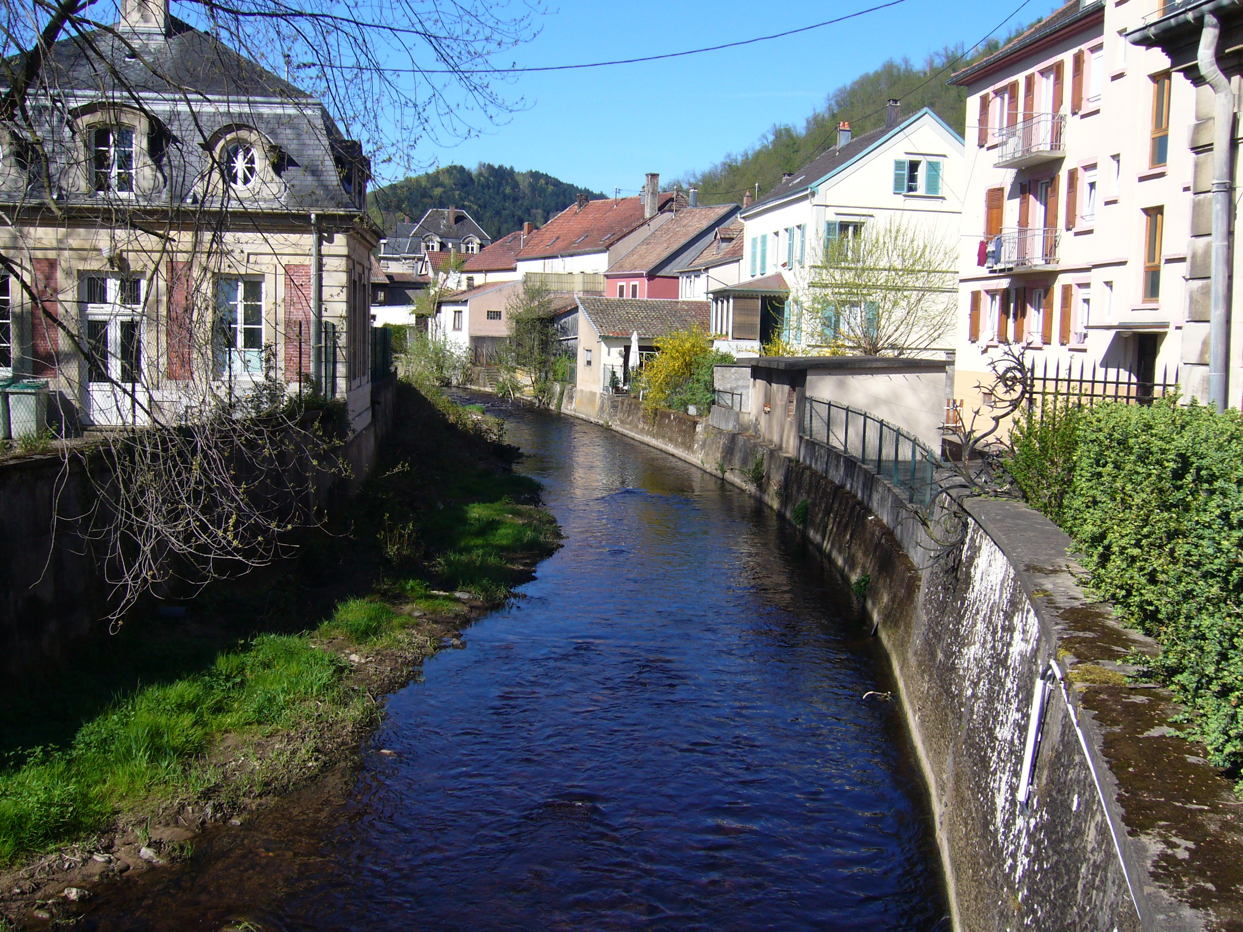 La Liepvrette à Sainte Croix-aux-Mines